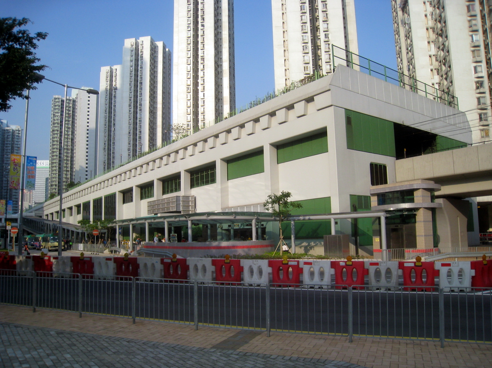 Kwai Fong Station 葵芳站